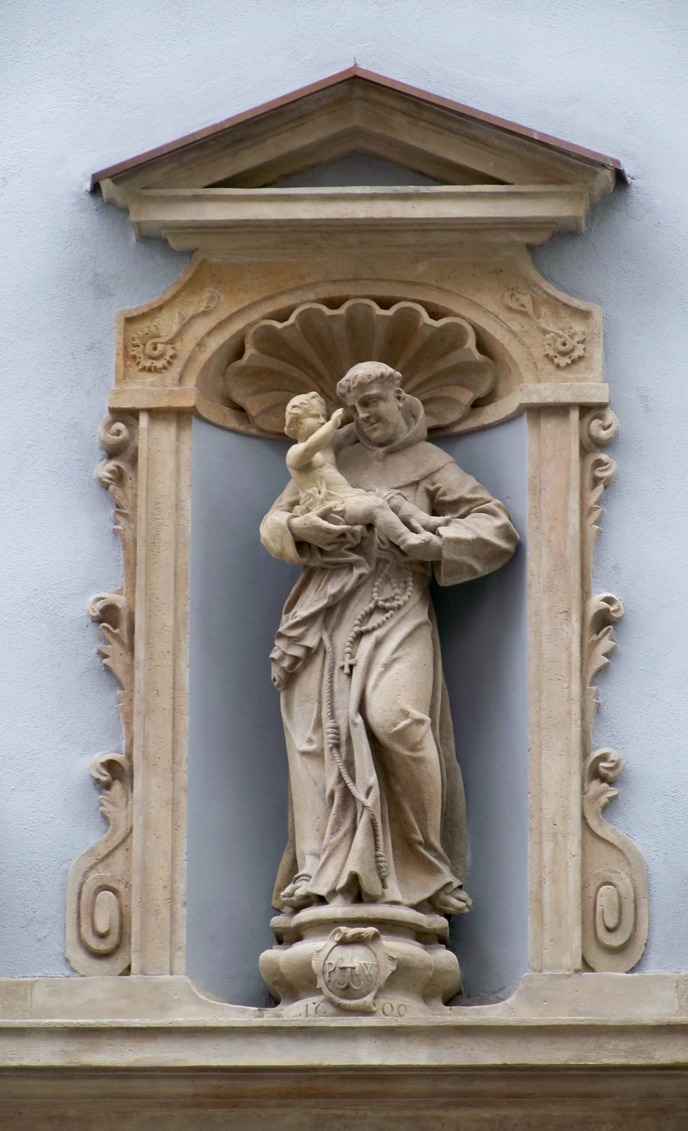 Figura w edykule kościoła św. Antoniego Padewskiego we Wrocławiu